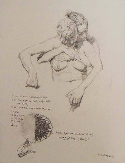 Serie: Studie zu Illustrationen des „Hohelied Salomon“, 2006, Nr.7, cm. 65x50, Kohle auf Fabriano weiss, Bez. u.r. „Timner 2006“